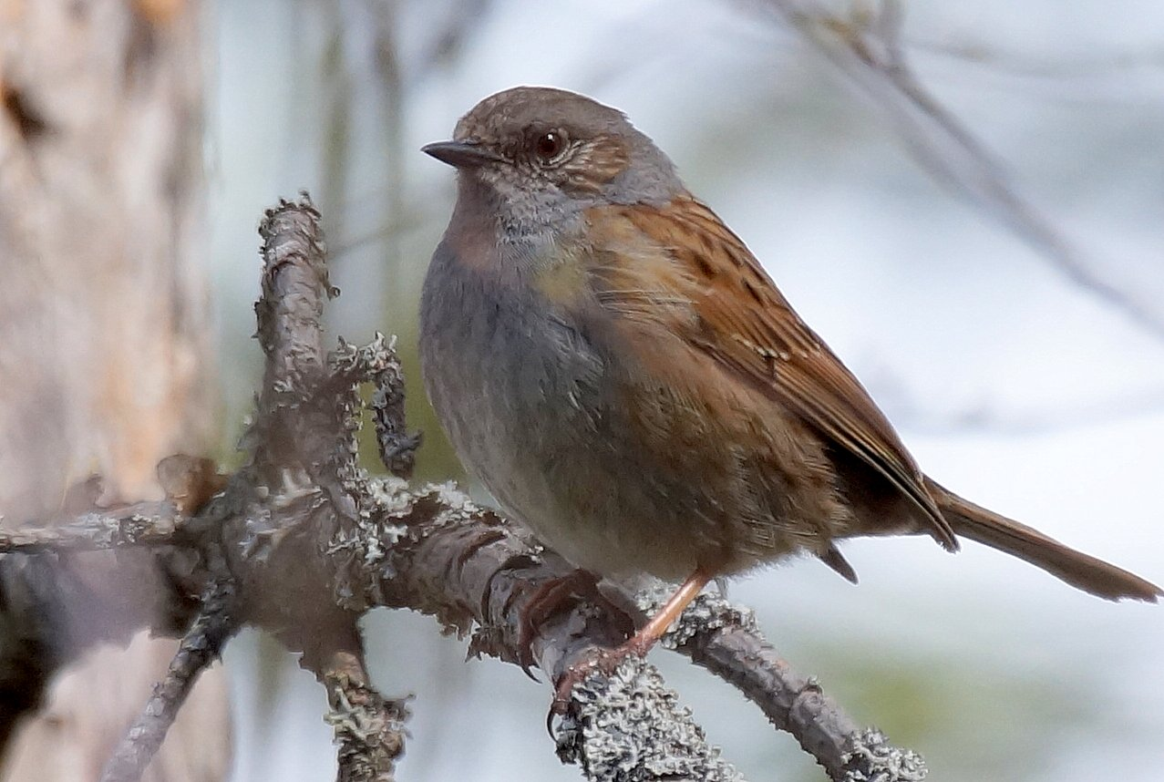 Rautiainen